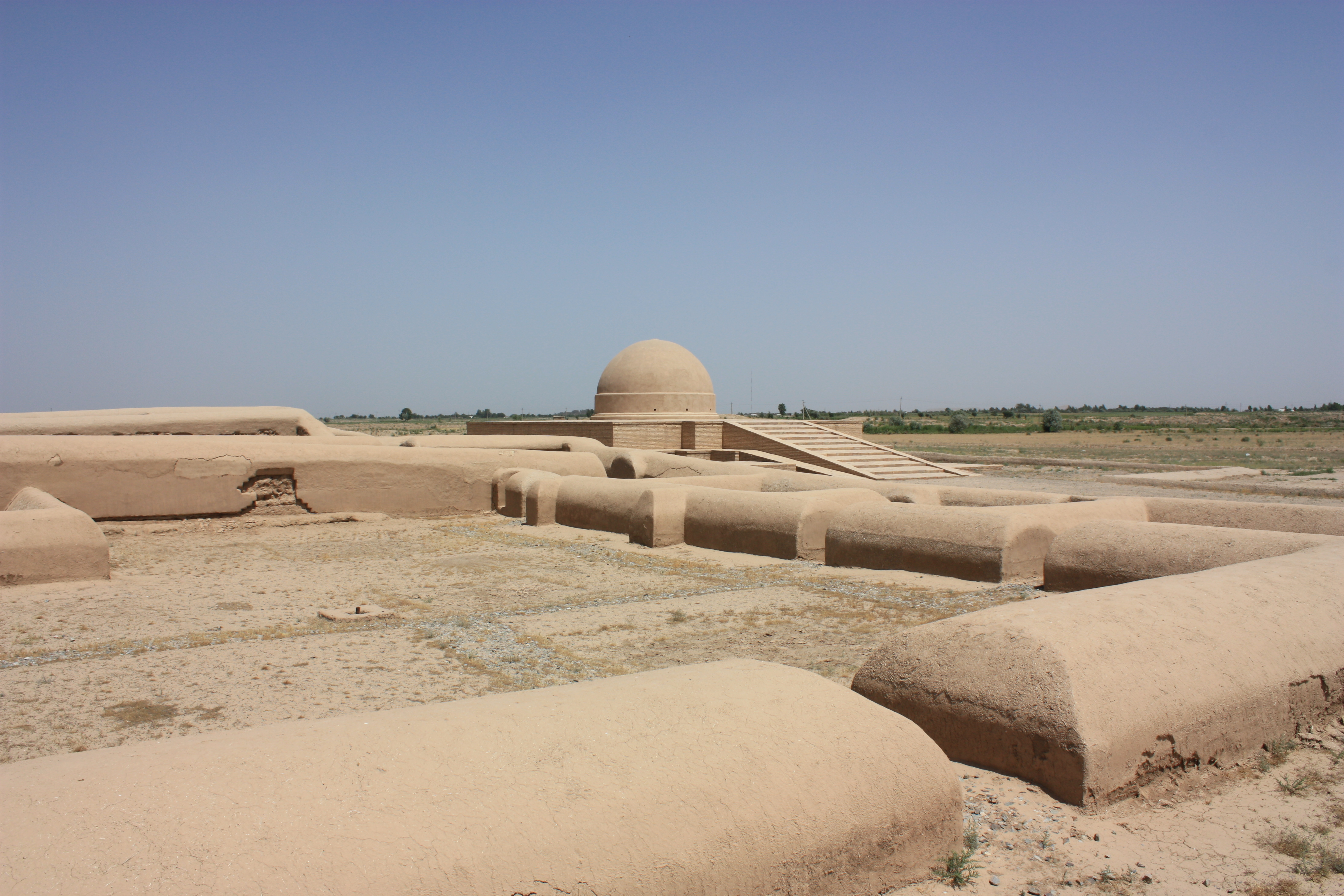 Fayoz-Tepe bei Termiz. Eine um 1968 entdeckte, buddhistische Klosteranlage aus dem 3.Jh. n.C., die Archäologen noch heute beschäftigt.